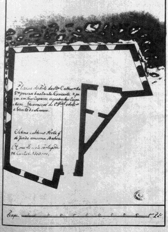 "Planta do Forte de Sta. Catharina da Praia" (Francisco Xavier Machado, 1772) enviada ao Reino em 1777, pelo Capitão-general Dinis Gregorio de Melo Castro e Mendonça, à guarda do Arquivo Histórico Ultramarino. Atualmente conservada no Arquivo Nacional da Torre do Tombo.